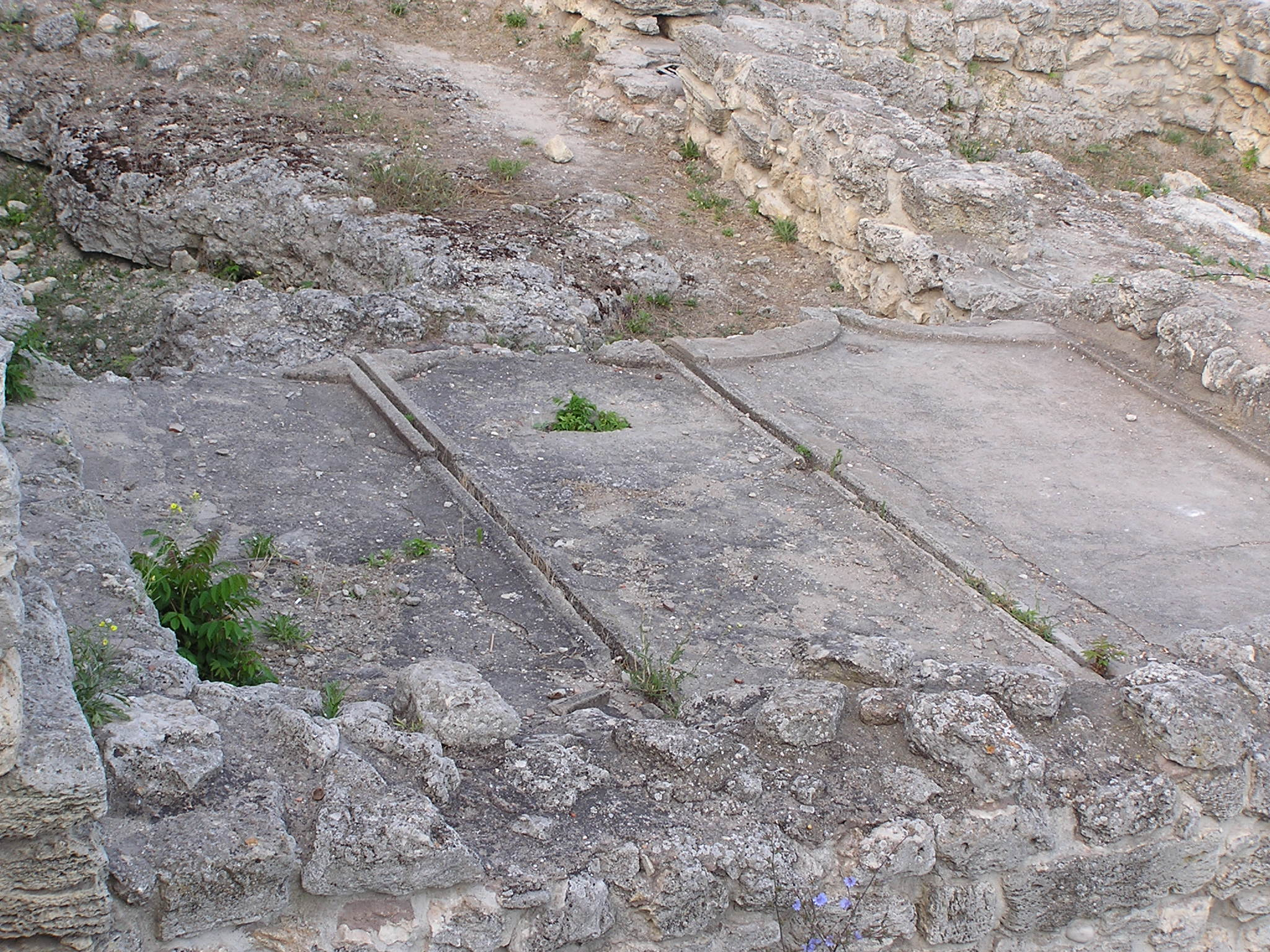 Херсонес. Дом винодела